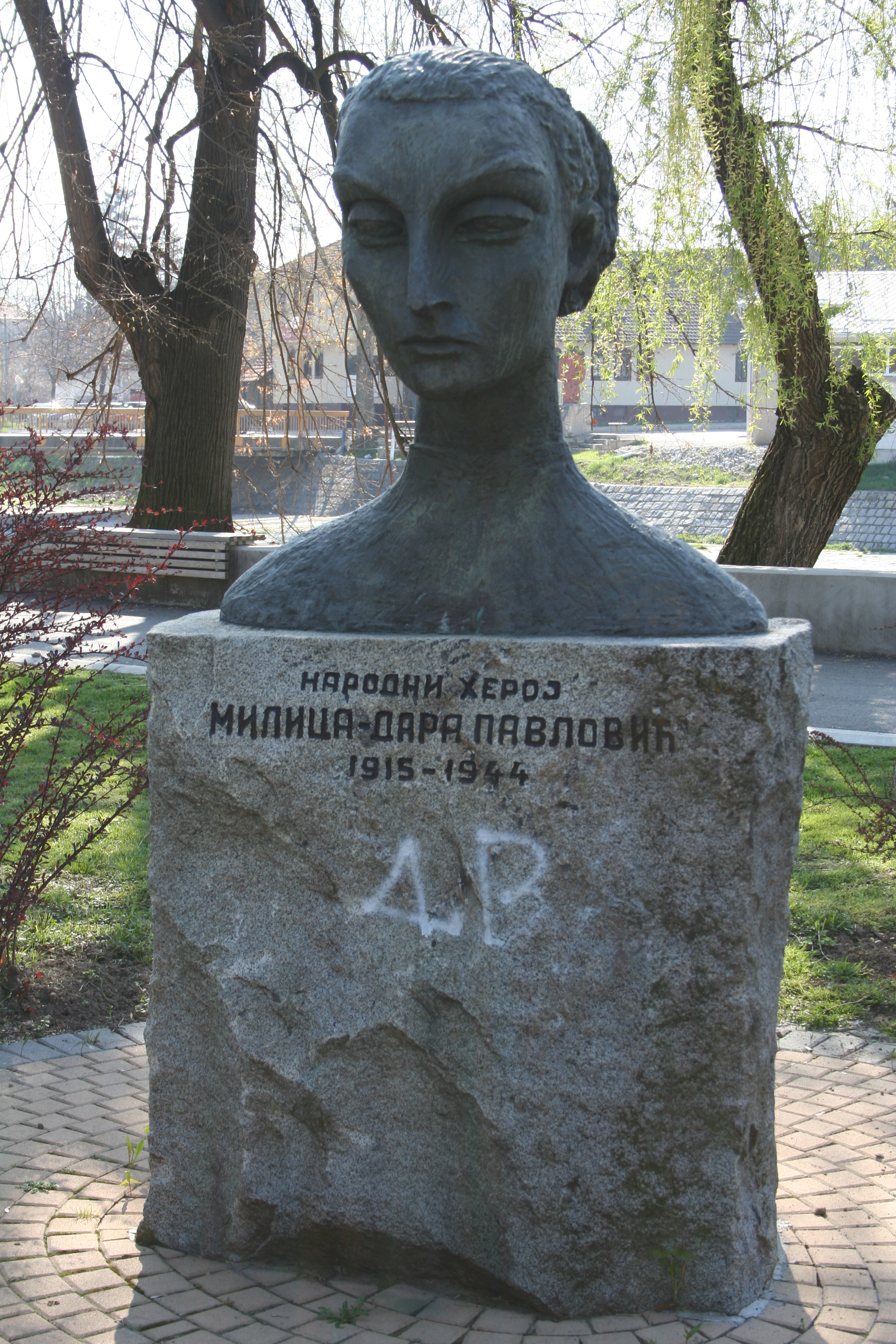 Spomenici, Valjevo